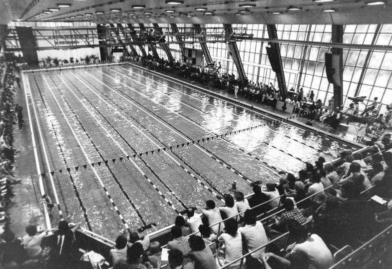 Gera, Schwimmhalle ADN-ZB Kasper 24.9.85-ma. Gera: Blick in die moderne Schwimmhalle in Gera.